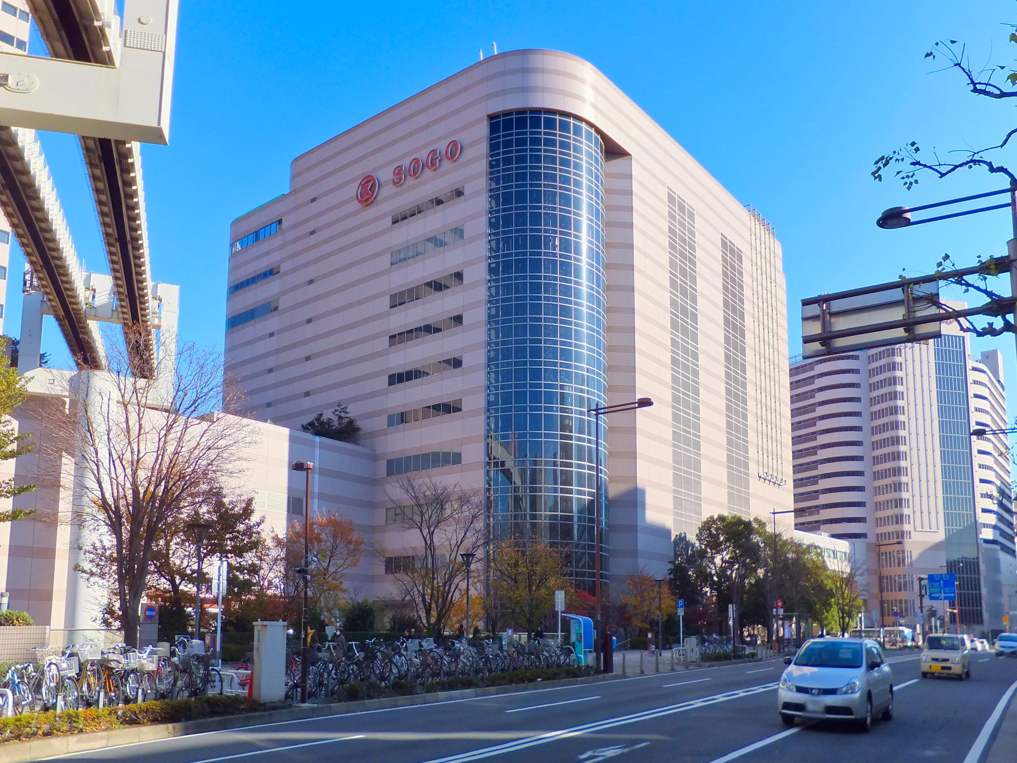 そごう千葉店。国道14号より